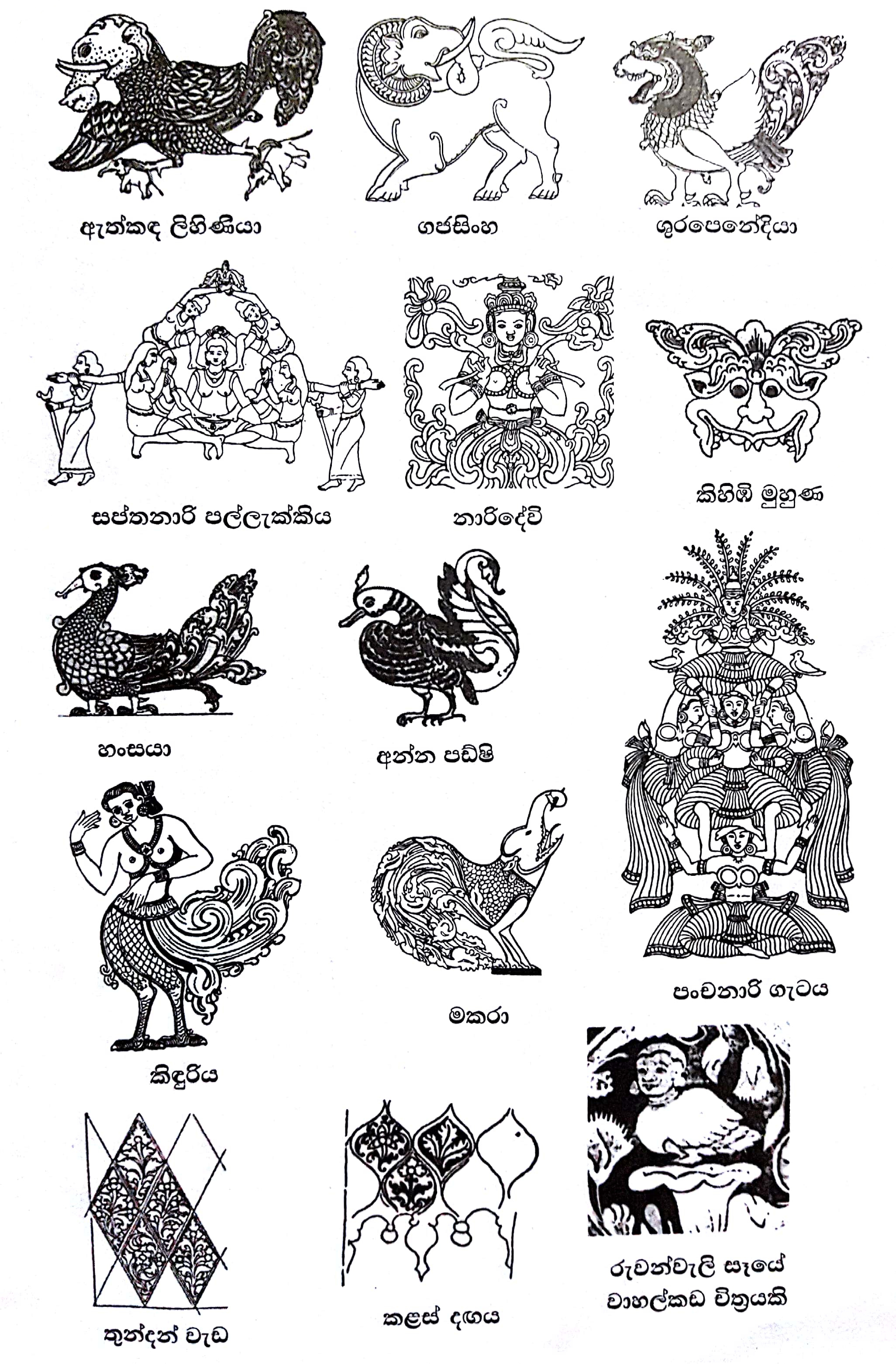 සිංහල: 18 වන සියවසට අයත් උඩරට කලා මොස්තර